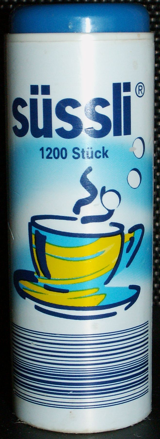 Süßstoffspender der weit verbreiteten Marke "Süssli", für den Artikel Süßstoff